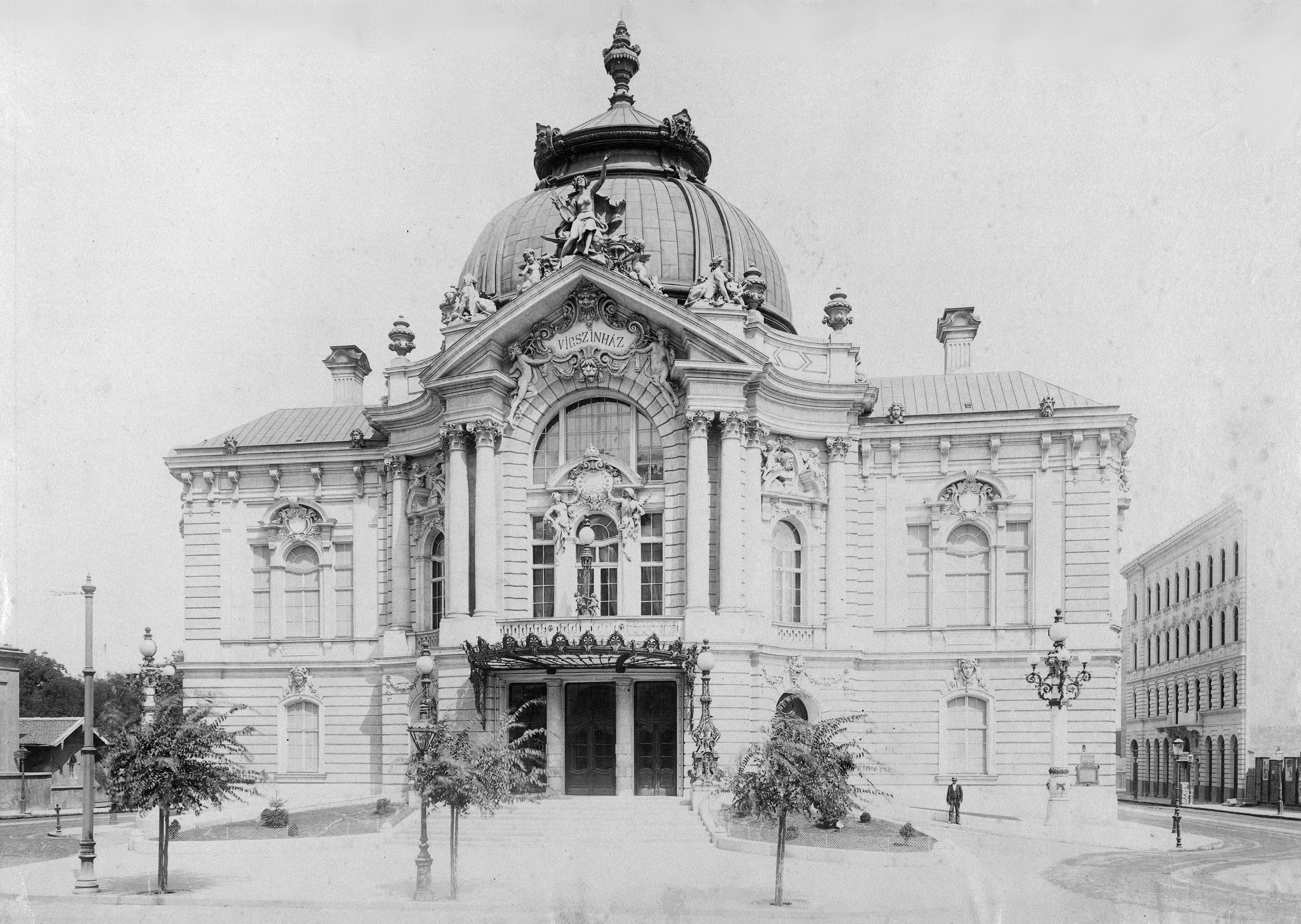 Szent István (Lipót) körút, Vígszínház. A felvétel 1896 körül készült. A kép forrását kérjük így adja meg: Fortepan / Budapest Főváros Levéltára. Levéltári jelzet: HU.BFL.XV.19.d.1.08.108